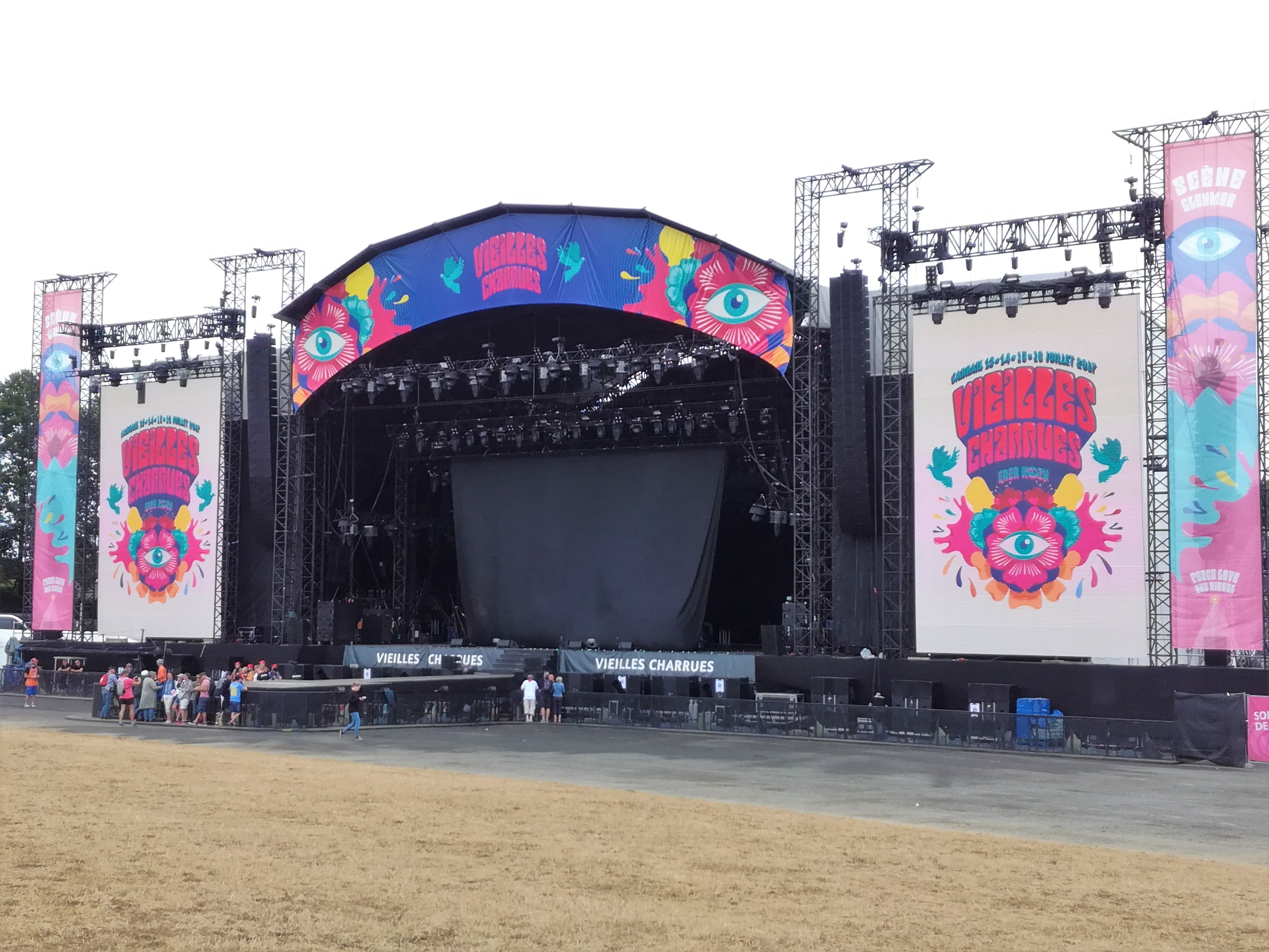 La scène Glenmor à l'ouverture des portes du festival des Vieilles Charrues le 14 juillet 2017.